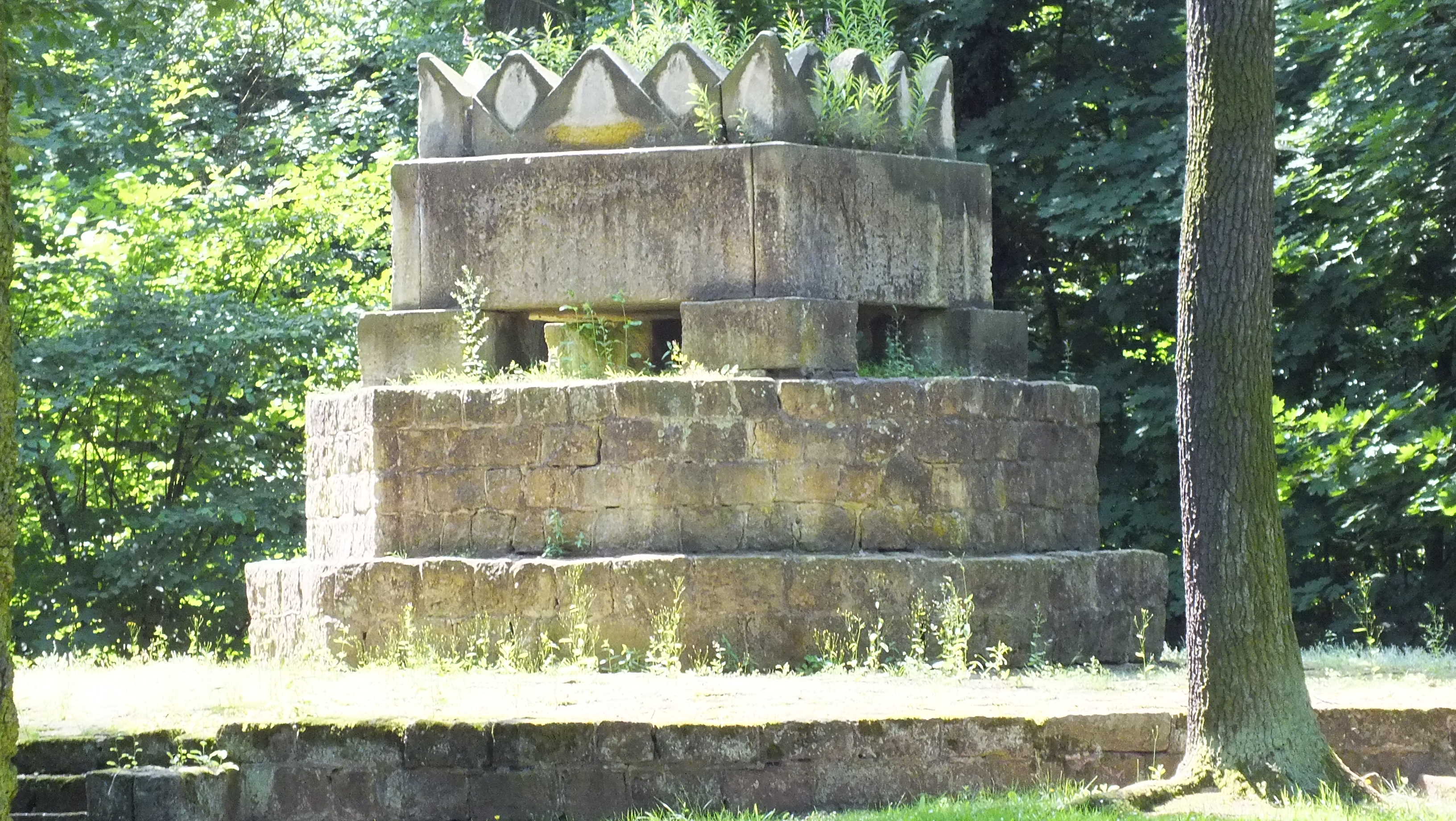 Kriegerdenkmal im Tiergarten Annaburg